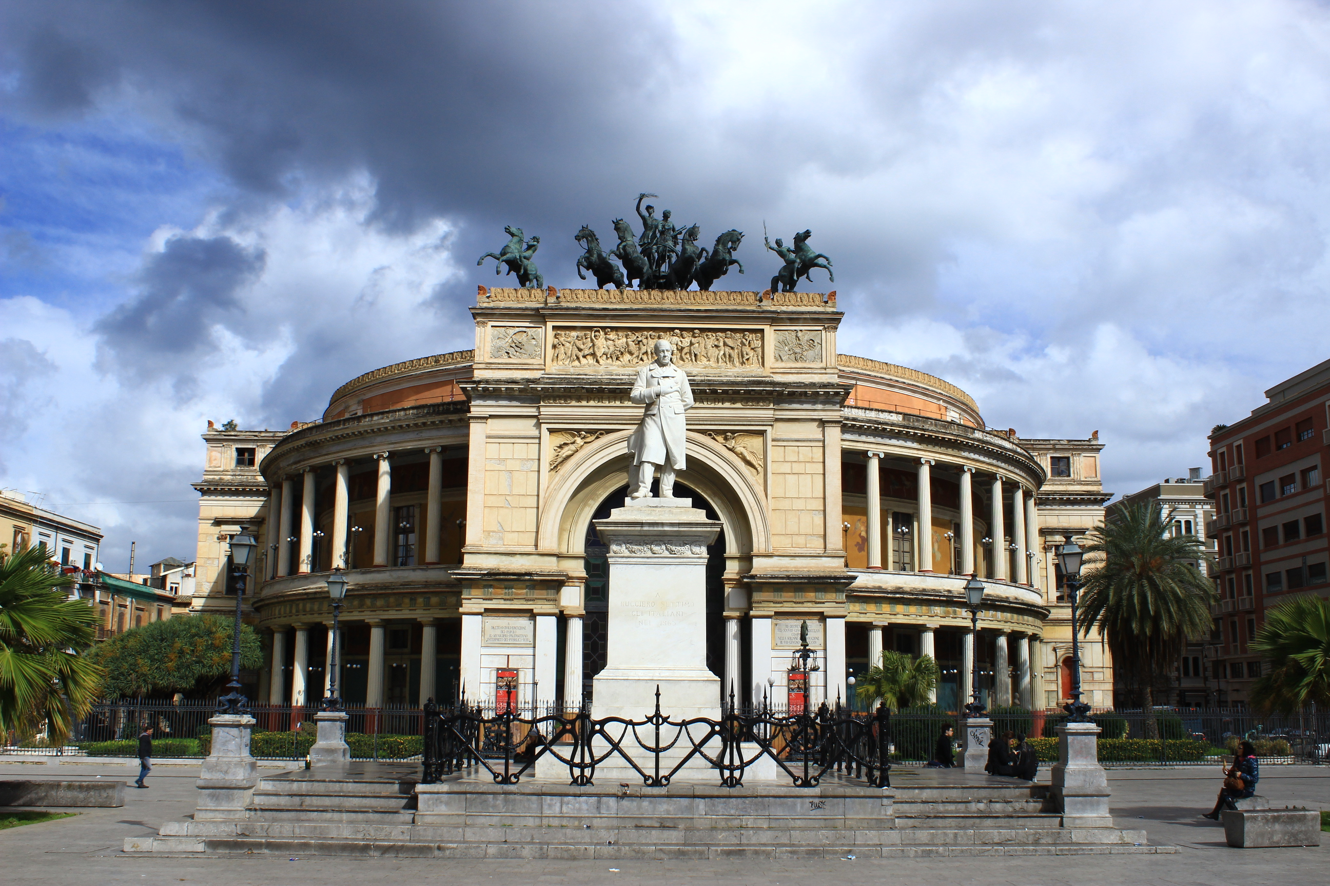 Teatro Politeama Garibaldi This is a photo of a monument which is part of cultural heritage of Italy.